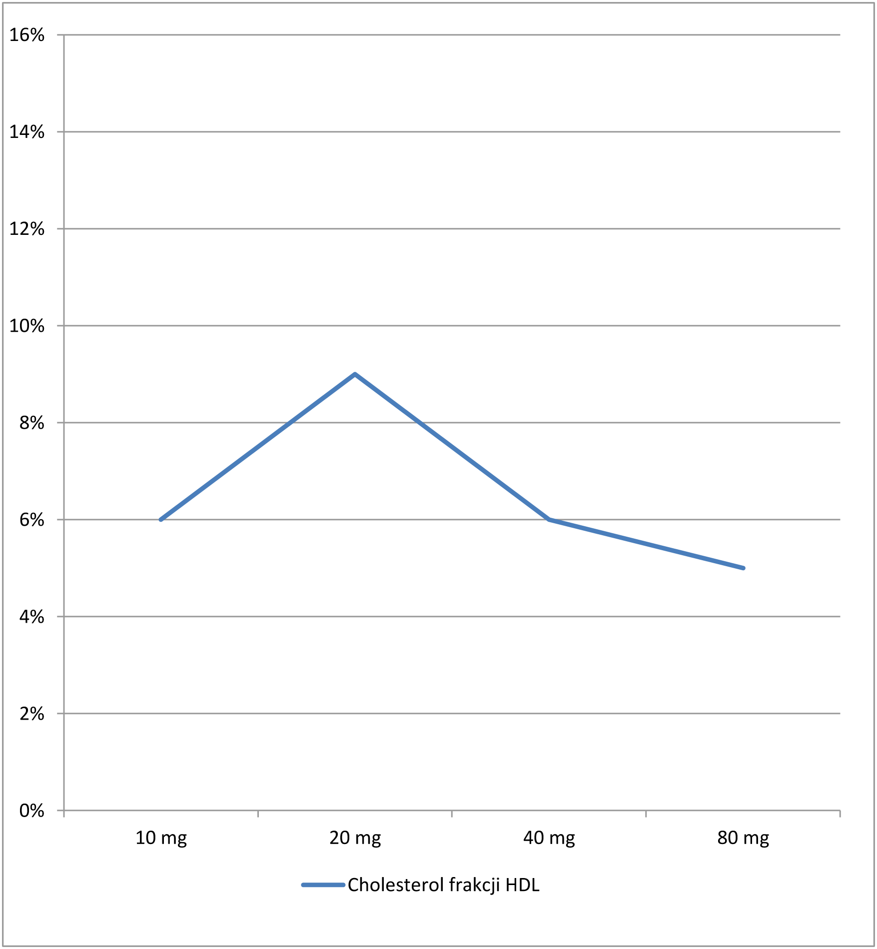 Wpływ atorwastatyny na wskaźniki lipidowe (dane do wykresu za LIPITOR® (atorvastatin calcium) Tablets for oral administration)